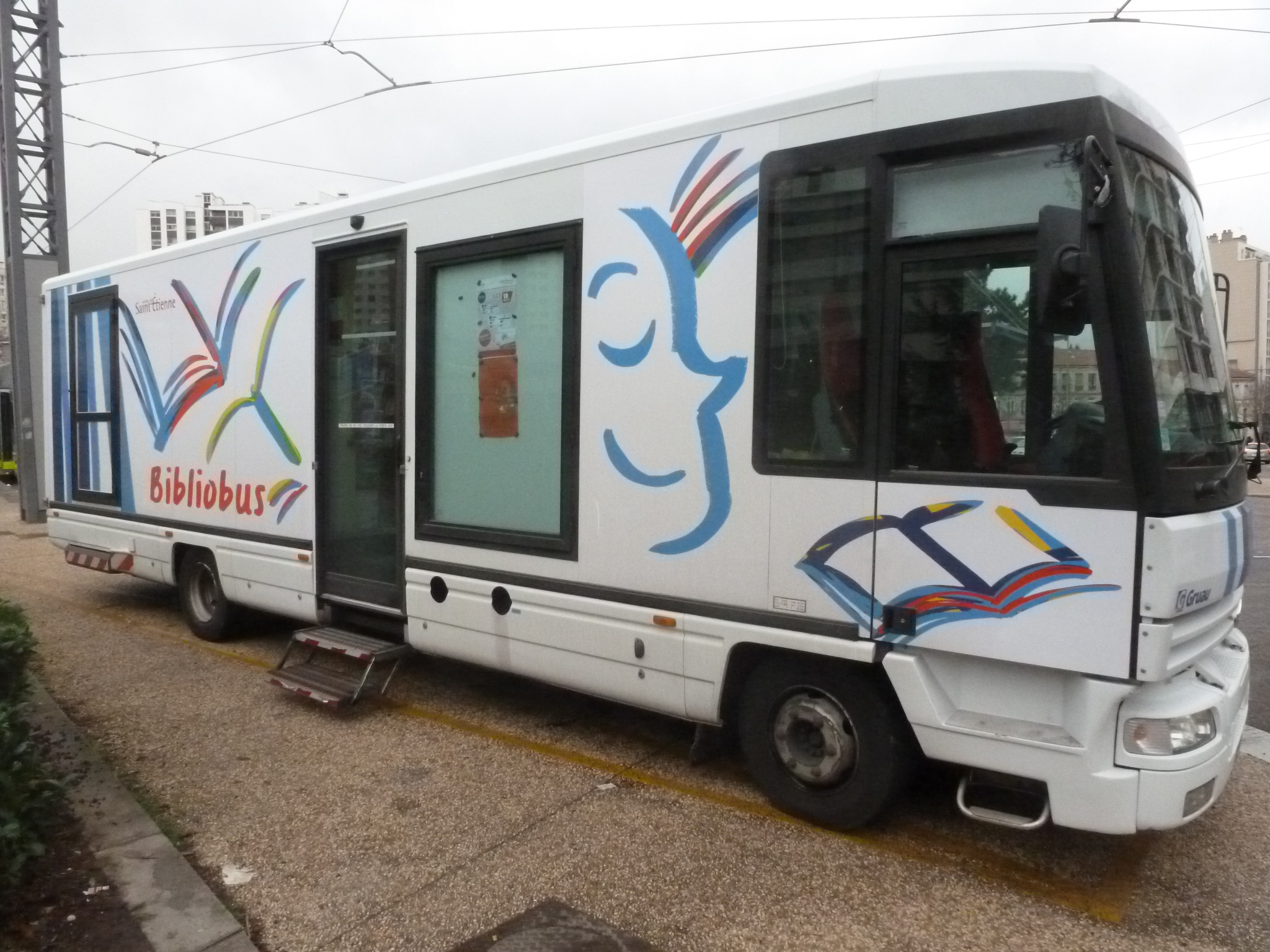 Bibliobus de la Ville de Saint-Etienne